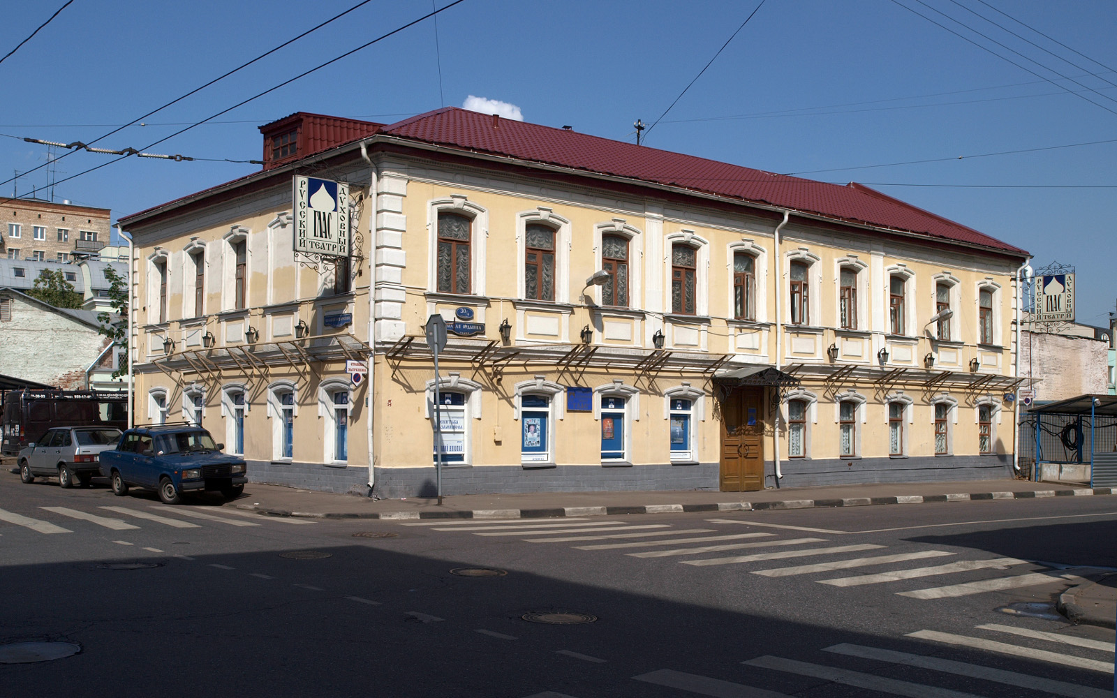 Малая Ордынка, Москва.